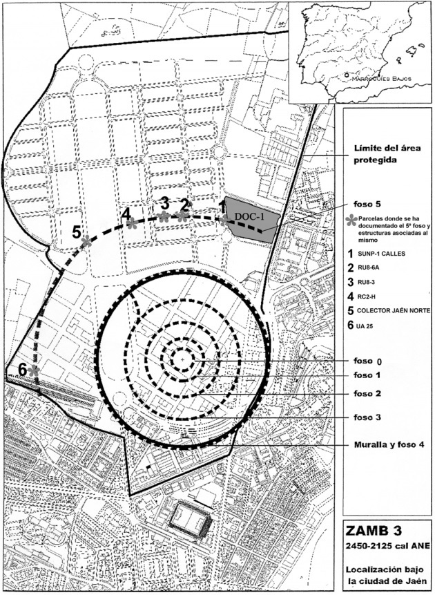 Representación idealizada de la configuración de los fosos de Marroquíes Bajos y localización de la parcela DOC-1.